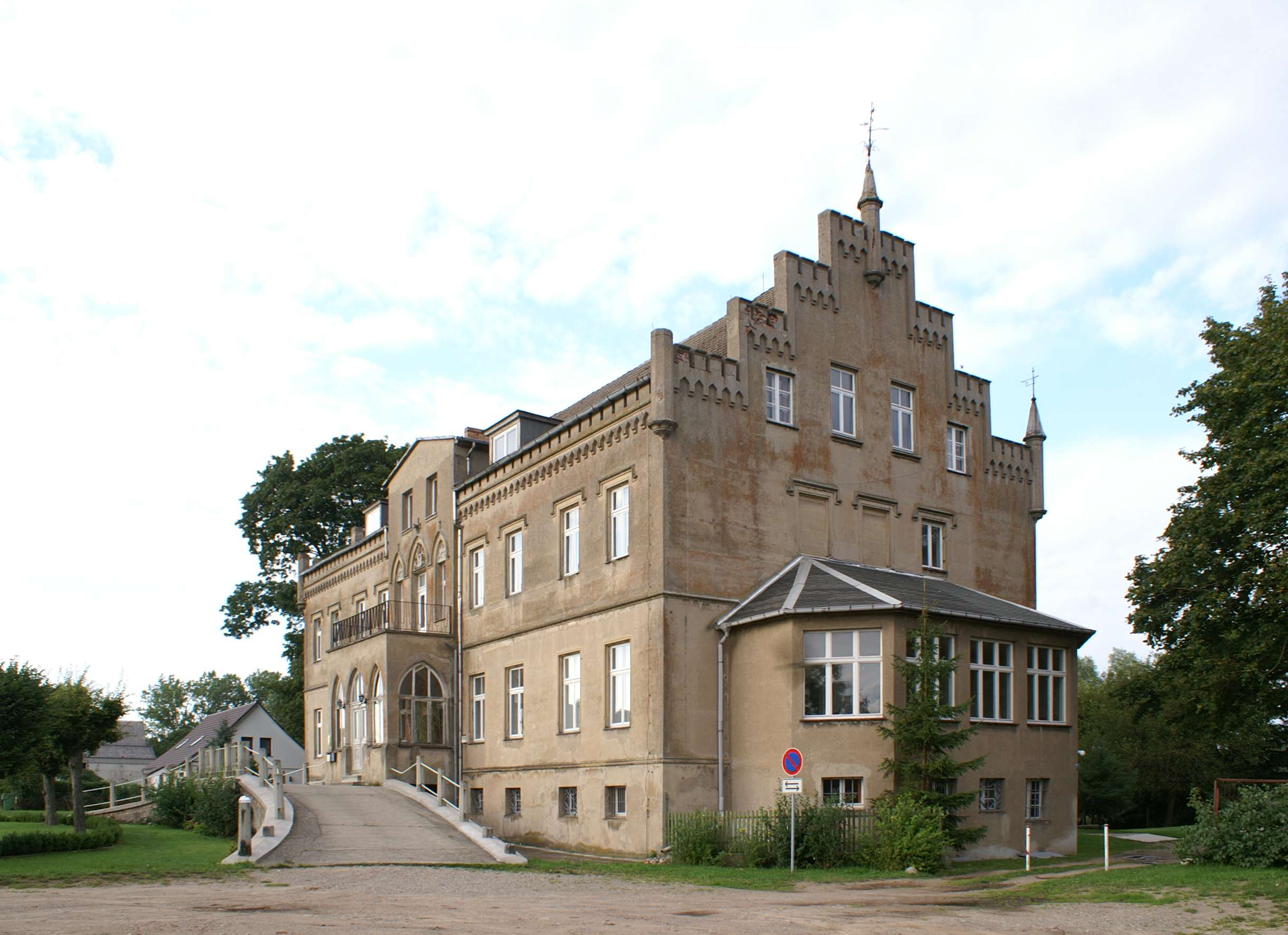 Wrangelsburg - Landkreis Ostvorpommern - Herrenhaus - Südgiebel und Westseite